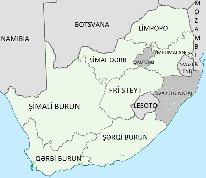 Cənubi afrika 1